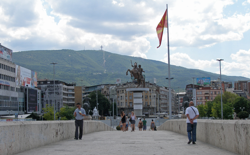 Widok na górę Wodno z centrum Skopje